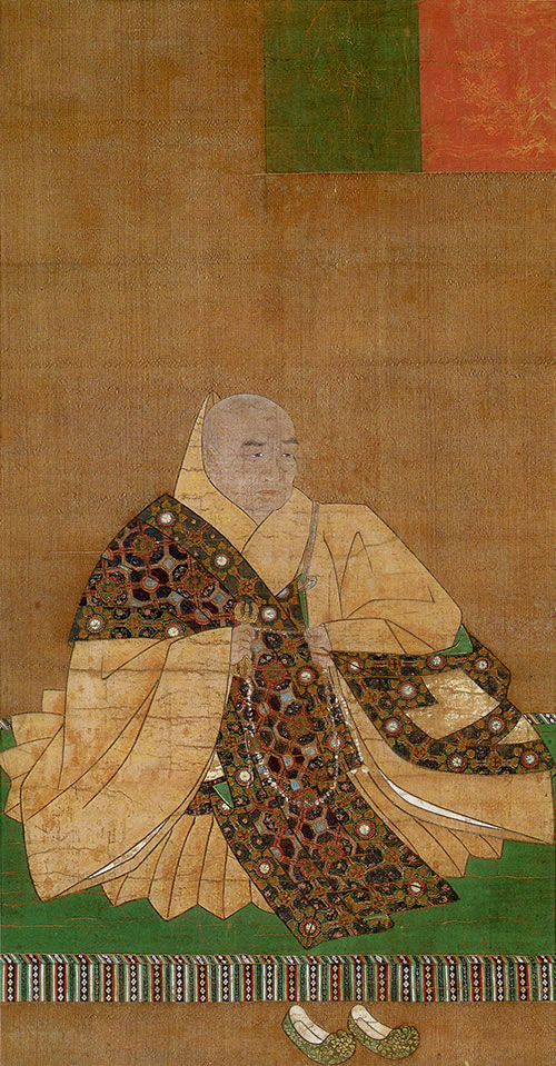 三宝院義演の頂相。